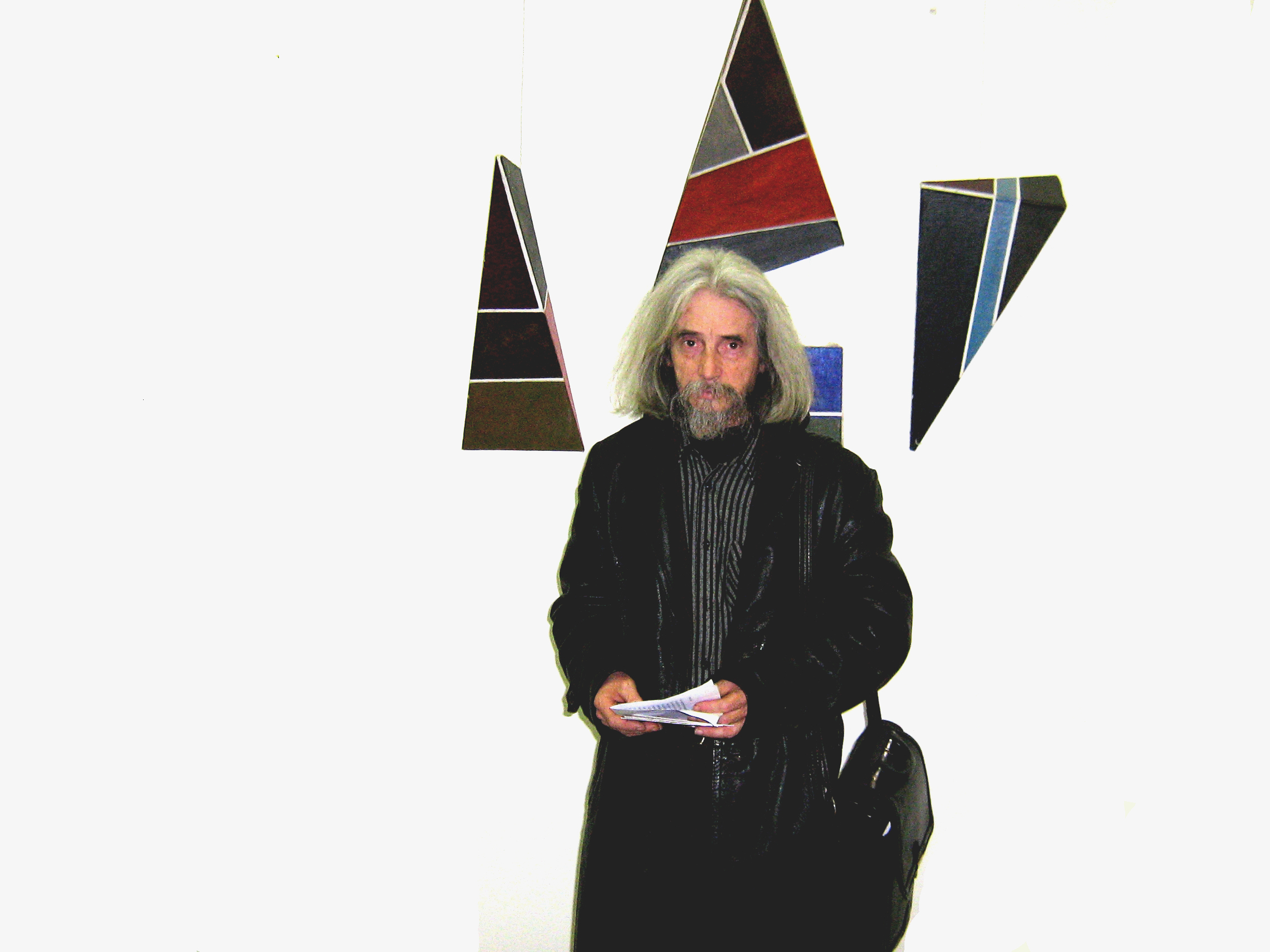 slikar Jozef Klaćik na 10 bienalu slovačkih slikara u Srbiji u Bačkom Petrovcu 2009. godine